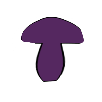 Sporophore a stipe ventru